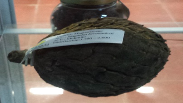 M hernandezzi